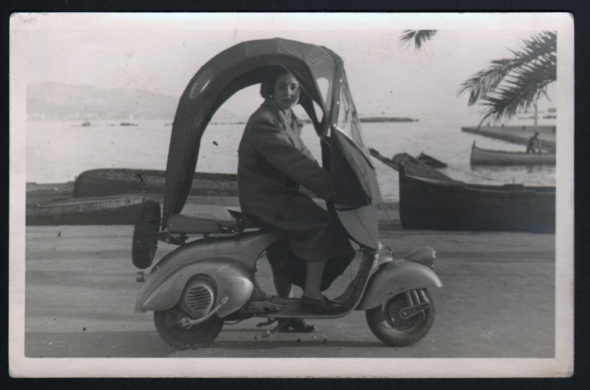 Una donna alla guida di una Vespa arricchita di accessori, come il parabrezza e il parapioggia, per renderla piu' confortevole e pratica, 1948. Questo veicolo e' considerato economico e maneggevole ed adatto a tutti coloro che vogliono muoversi rapidamente. (AS Pescara, Archivio privato D'Ascanio Corradino, b. 2, fasc. 34, n. 2)